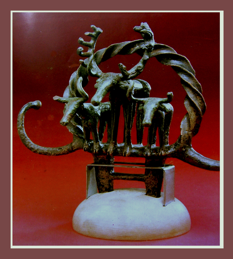 Kr. e. 3. századi rituális bronzeszköz Alacahöyükből (Anatóliai Civilizációk Múzeuma, Ankara, Törökország)